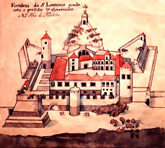 Fortaleza-Palácio de São Lourenço, Funchal, Ilha da Madeira: detalhe da "Descrição da Ilha da Madeira, Cidade do Funchal, Villas, Lugares, Ribeiras, Portos e Enceadas, e mais Secretos…" de Bartolomeu João (meados do século XVII).